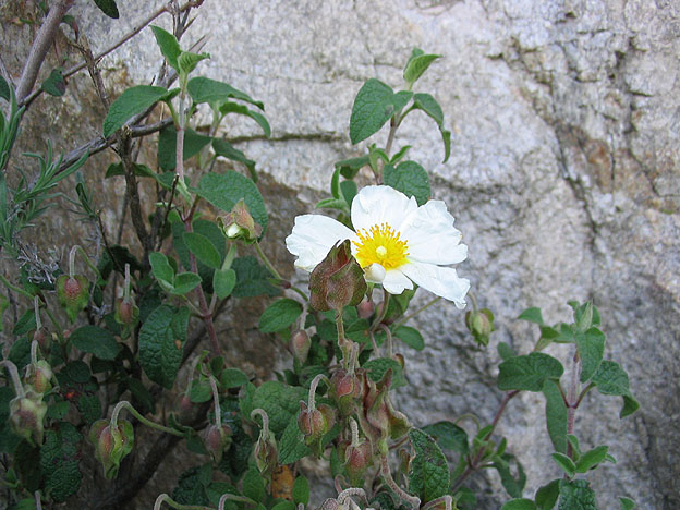 Cistus salviifolius, Cistaceae